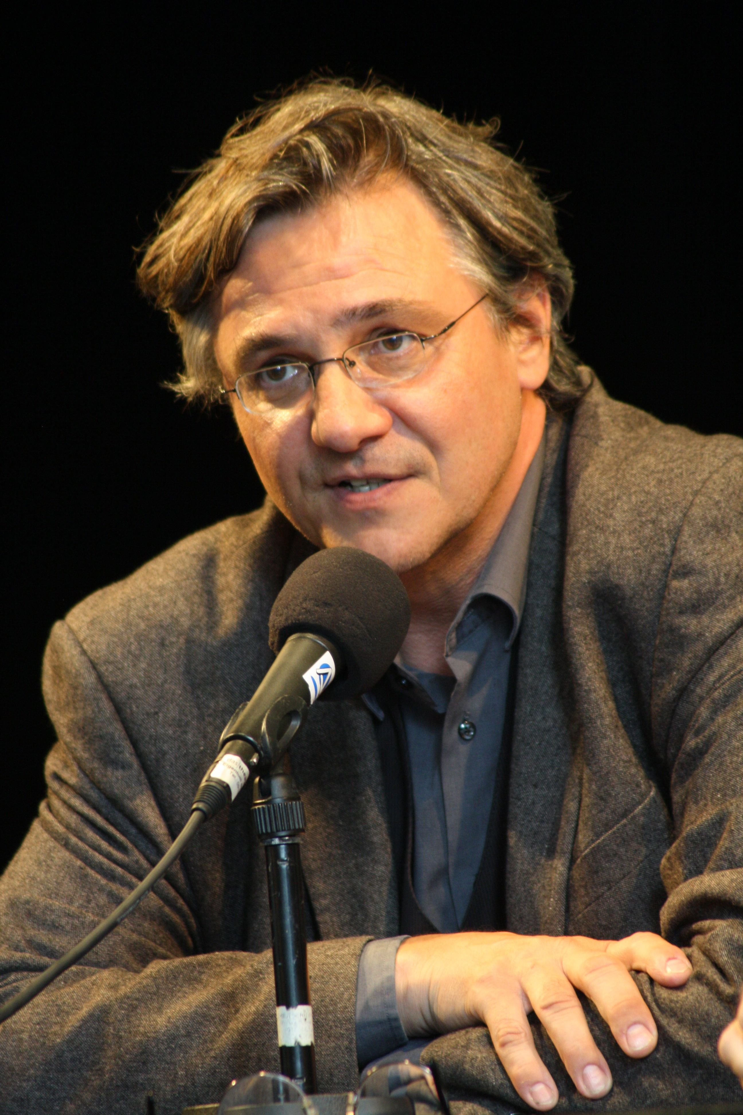 Michael Maar, deutscher Literaturkritiker, Essayist und Schriftsteller - auf dem Erlanger Poetenfest 2012